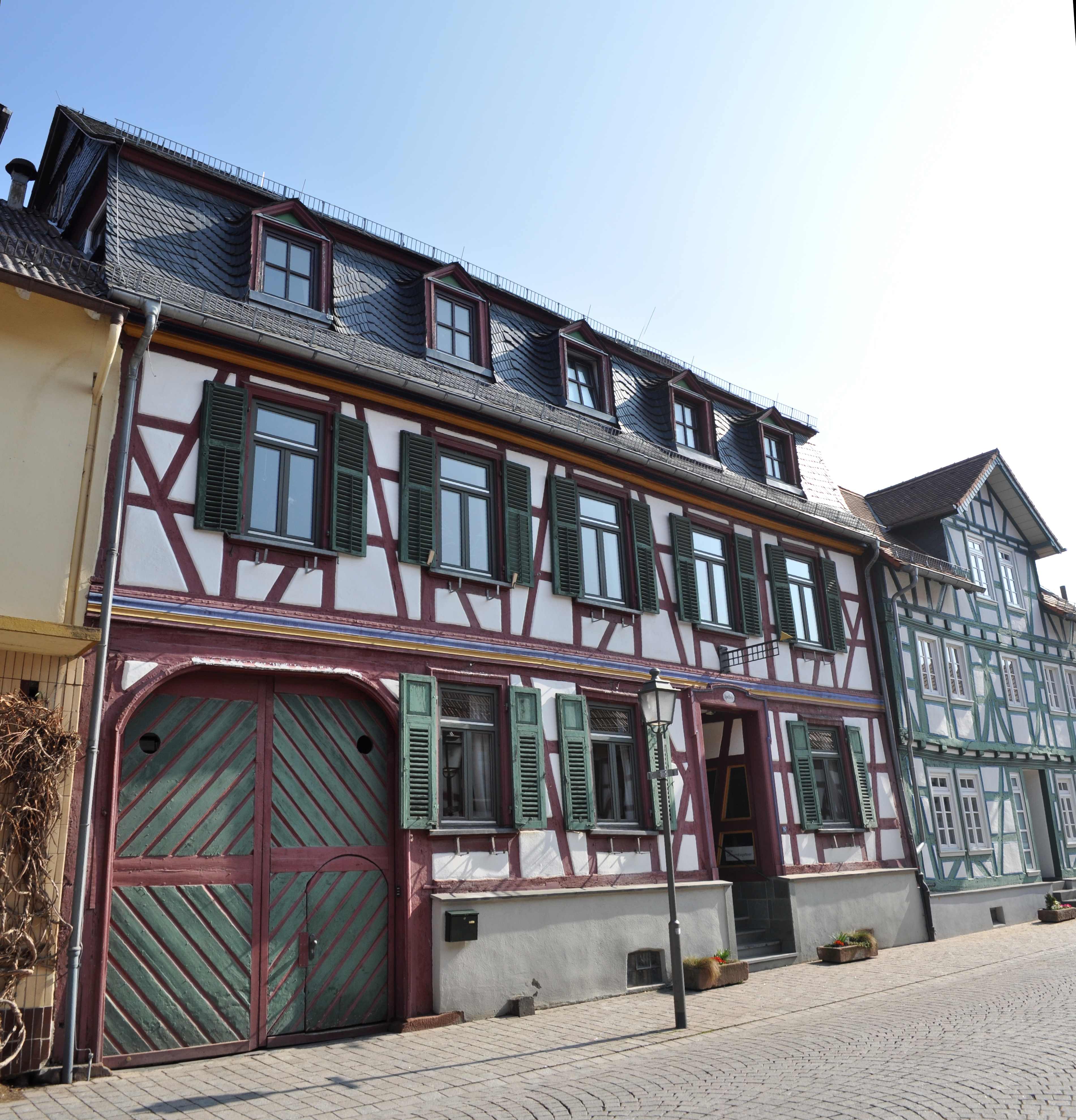 Idstein, Weiherwiese 16